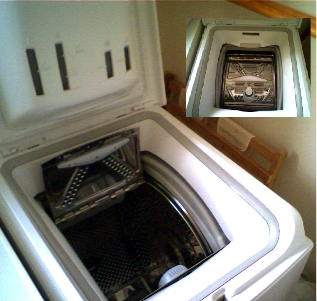 European top washing machine. Machine à laver à chargement dessus